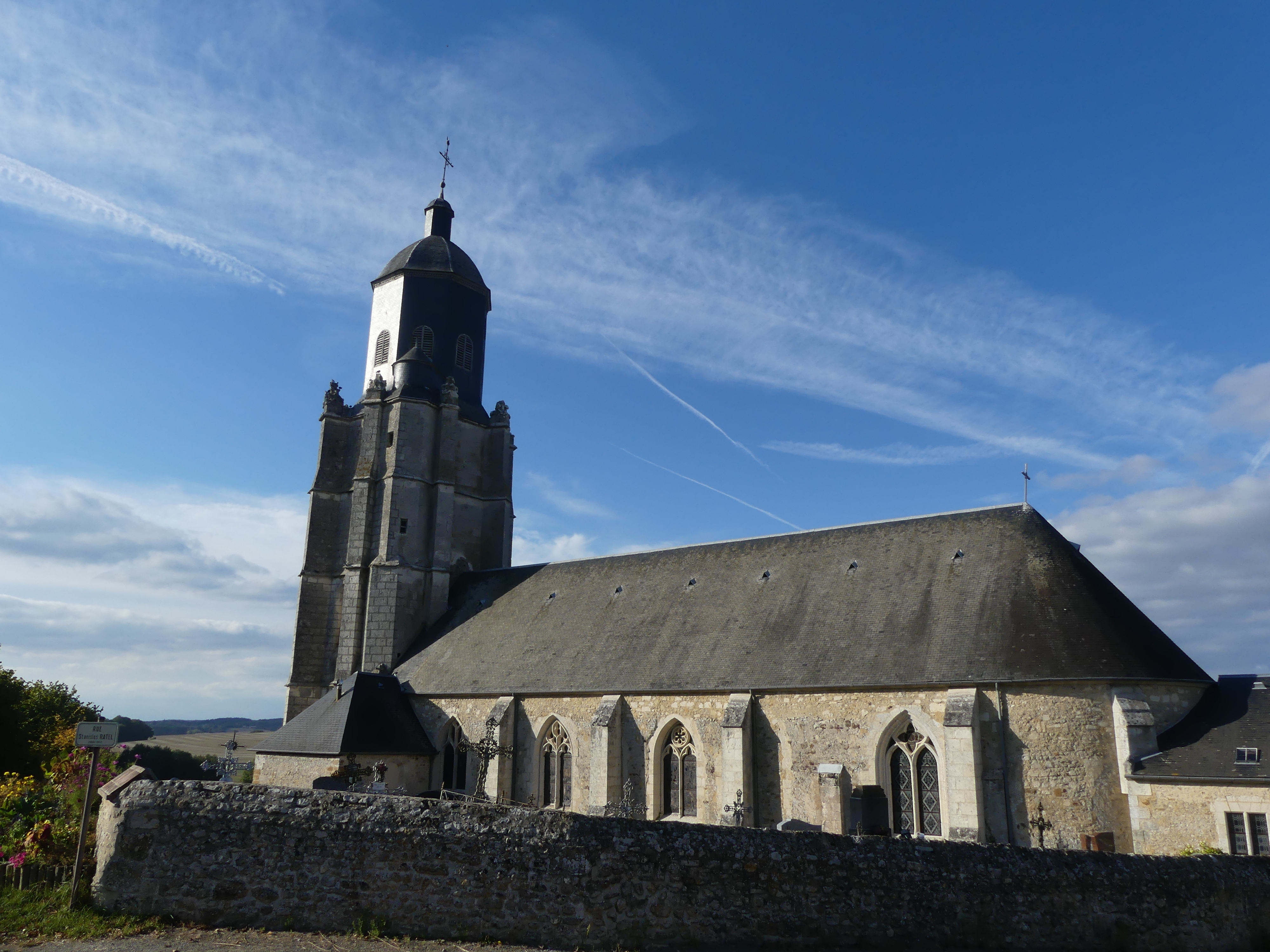 origine romanen flèche foudroyée en 1836 tour renaissance